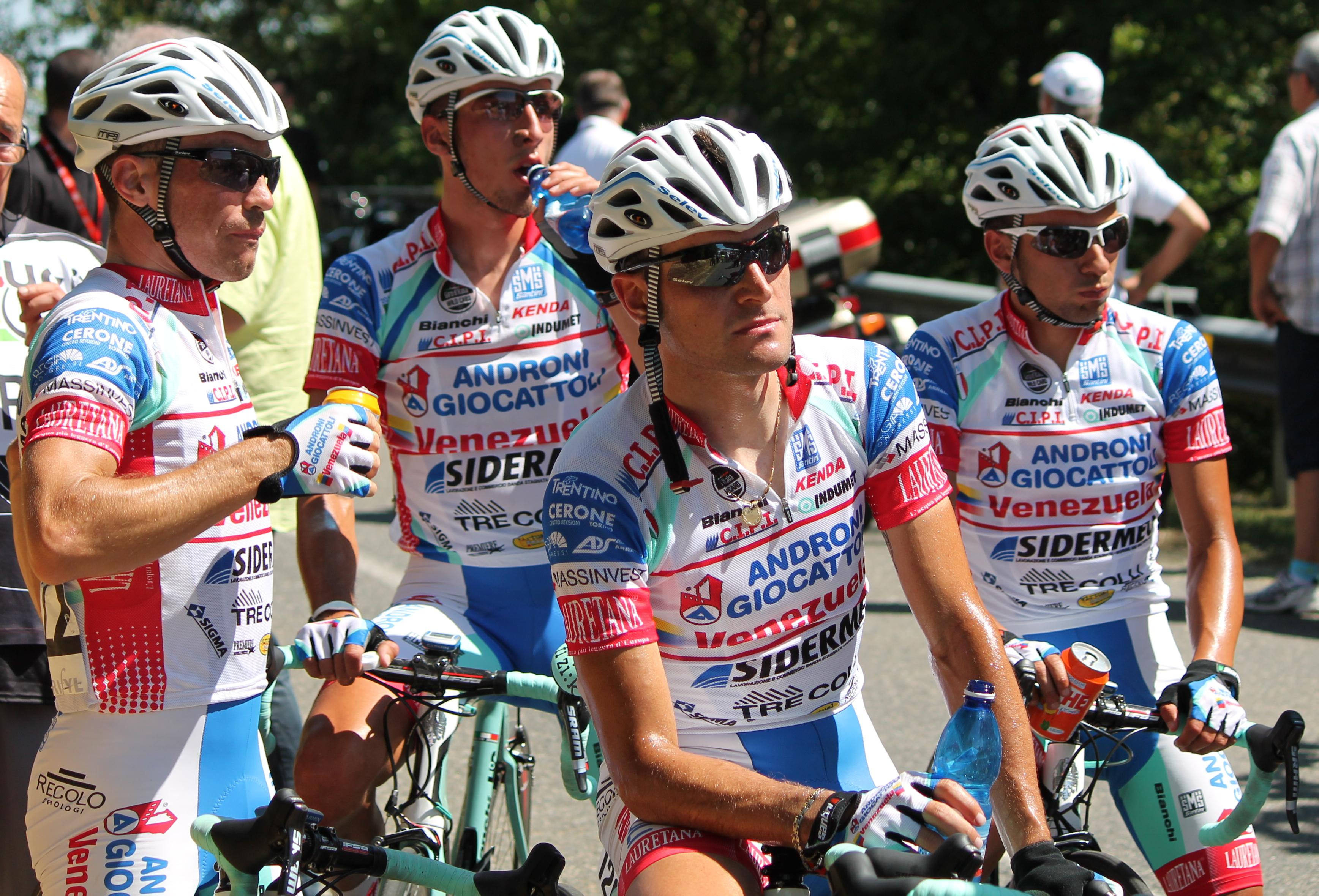 The Androni Giocatolli squad after the stage 2 of the Route du Sud 2012 (Saint-Michel, Arnaud Démare' win).